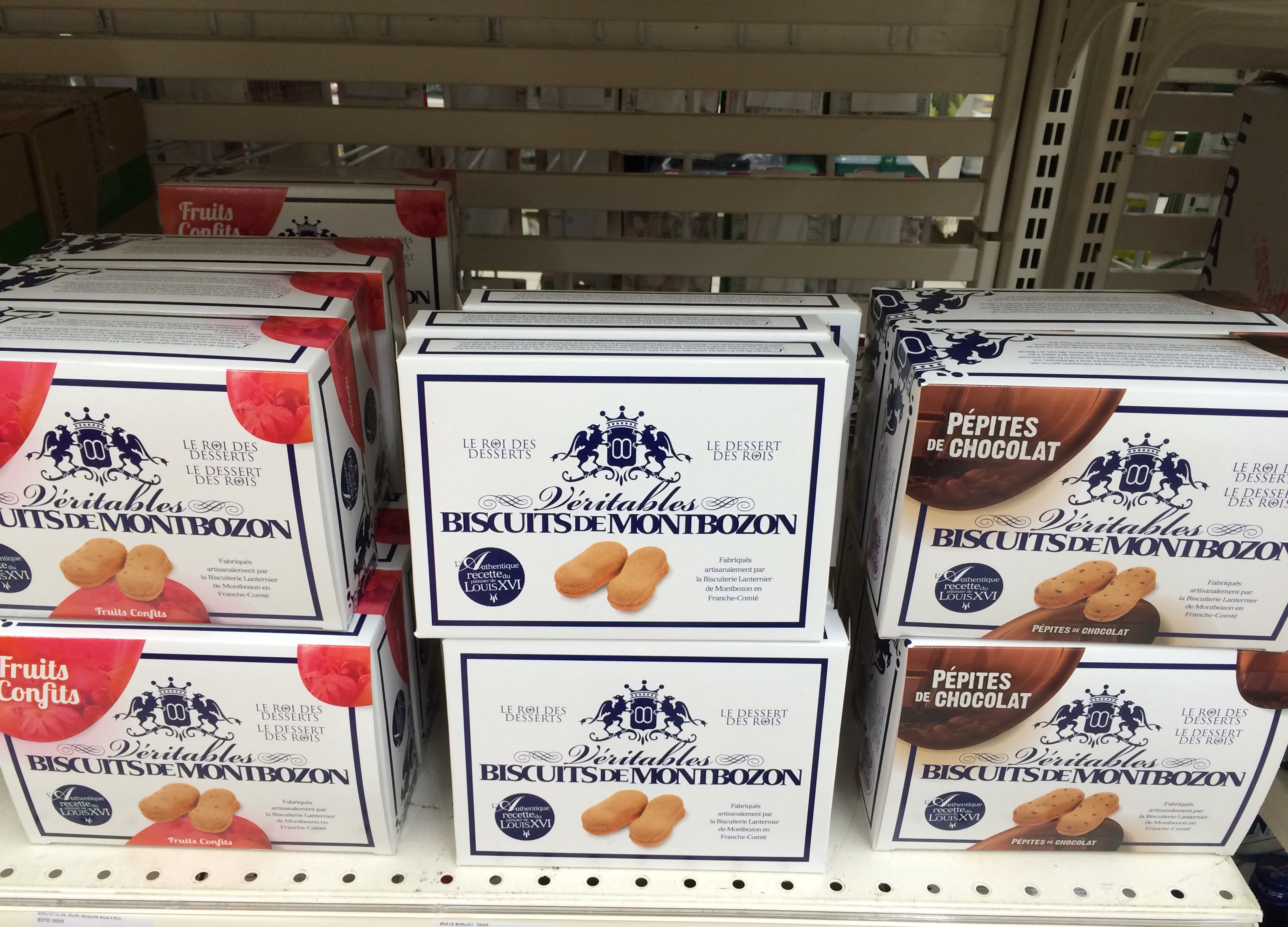 Biscuits de Montbozon en rayonnage de grande surface : au centre, la version originale, à gauche avec fruits confits et à droite au chocolat.